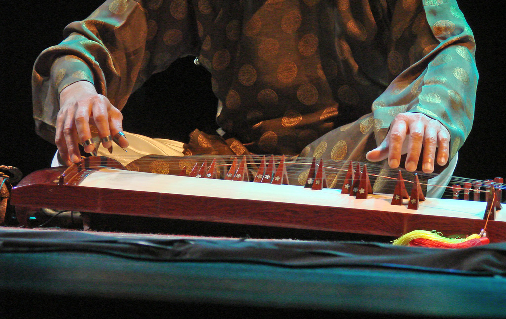 Concert du vendredi 9 novembre, dans l'auditorium du musée Guimet à Paris. Huong Thanh Trio, Musique traditionnelle du Vietnam avec Mieko Miyazaki, invitée Avec Huong Thanh (vocal), Hong Nguyen et Hao Nhiên Pham (Dan Tranh, Dan Bau, Dan Nguyet, T’rung, Dan Nhi, Dan Ty Ba Song loan, Senh tien, De drum) Huong Thanh a proposé une interprétation de la musique traditionnelle des trois régions du Vietnam : celle du Nord, voluptueuse et céleste, celle du Sud, nostalgique et touchante, en passant par celle du Centre, majestueuse et impériale.